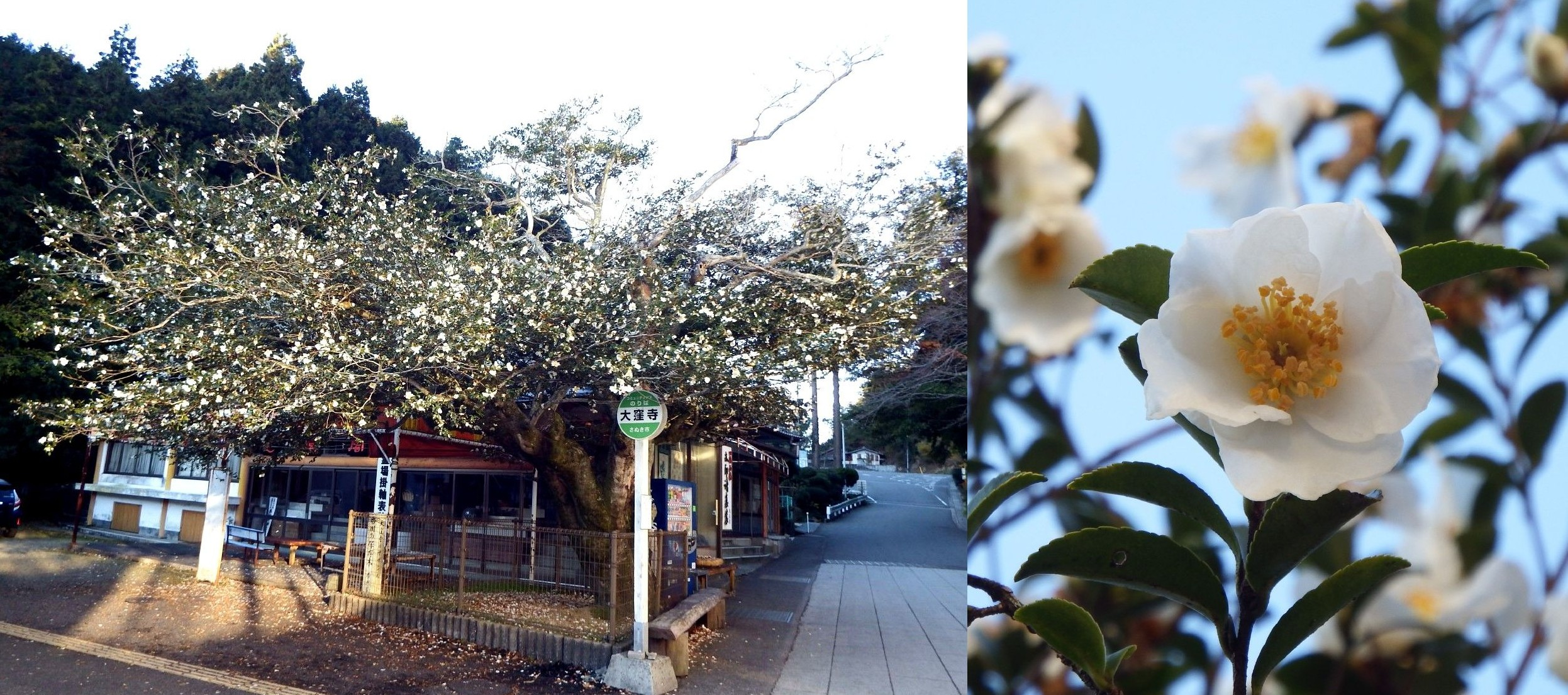 大窪寺のサザンカ